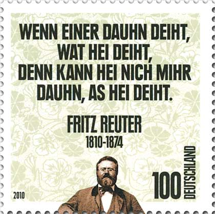 Stamp description / Briefmarkenbeschreibung